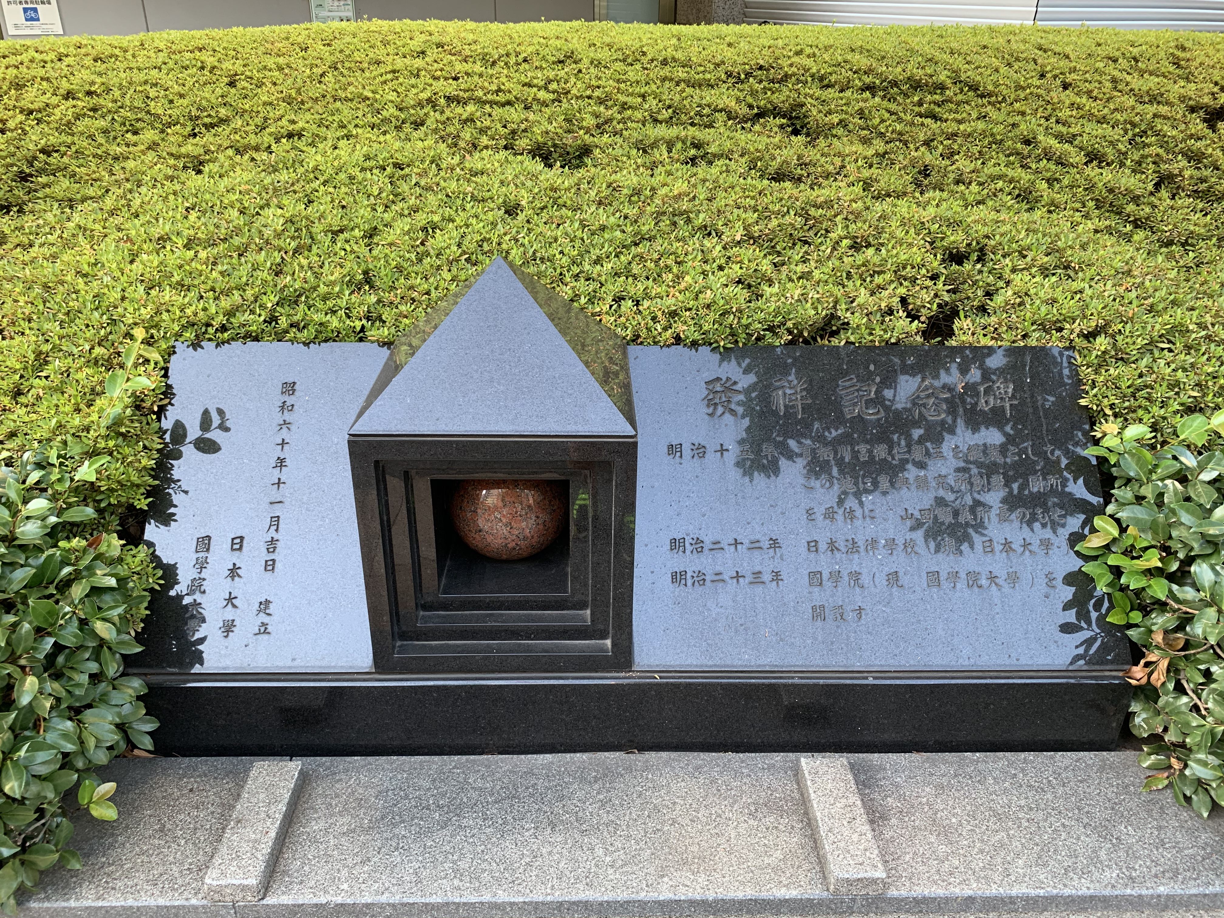 國學院大學・日本大学の前身にあたる皇典講究所の元校地・飯田橋に置かれた碑。日本大学と國學院大學が1985年（昭和60年）に設置。